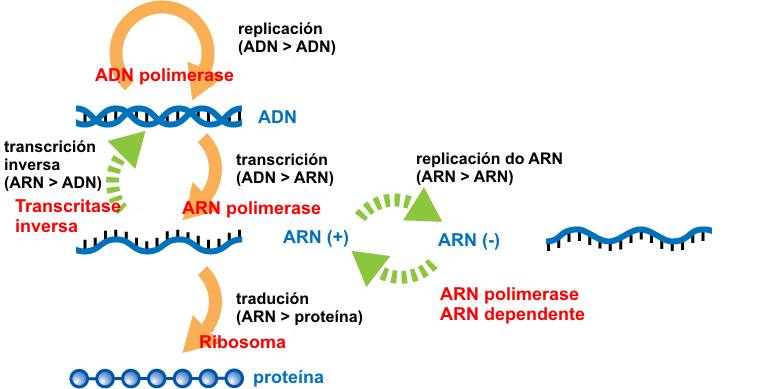 Central dogma, enzymes and processes